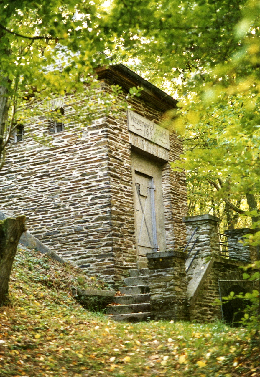 Wasserwerkstation II des Lösnicher Wasserwerksvon 1927 "Im neuen Berg" nahe dem Bögertsbach 1983